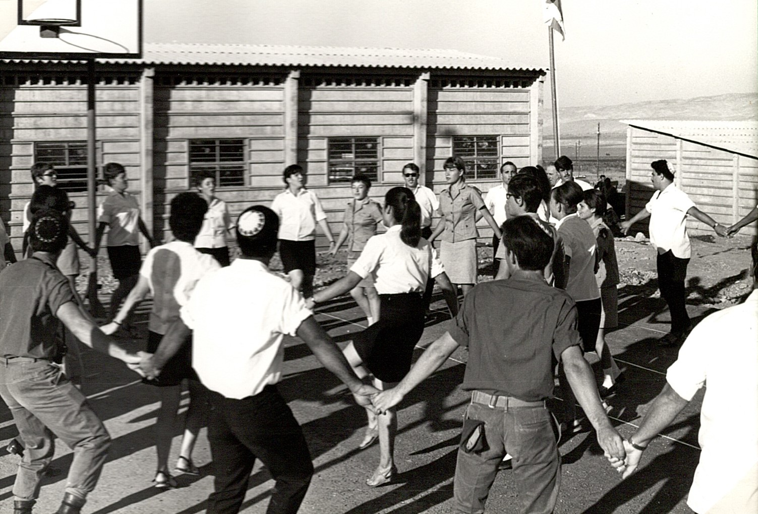 באדיבות ארכיון המועצה האזורית בקעת הירדן